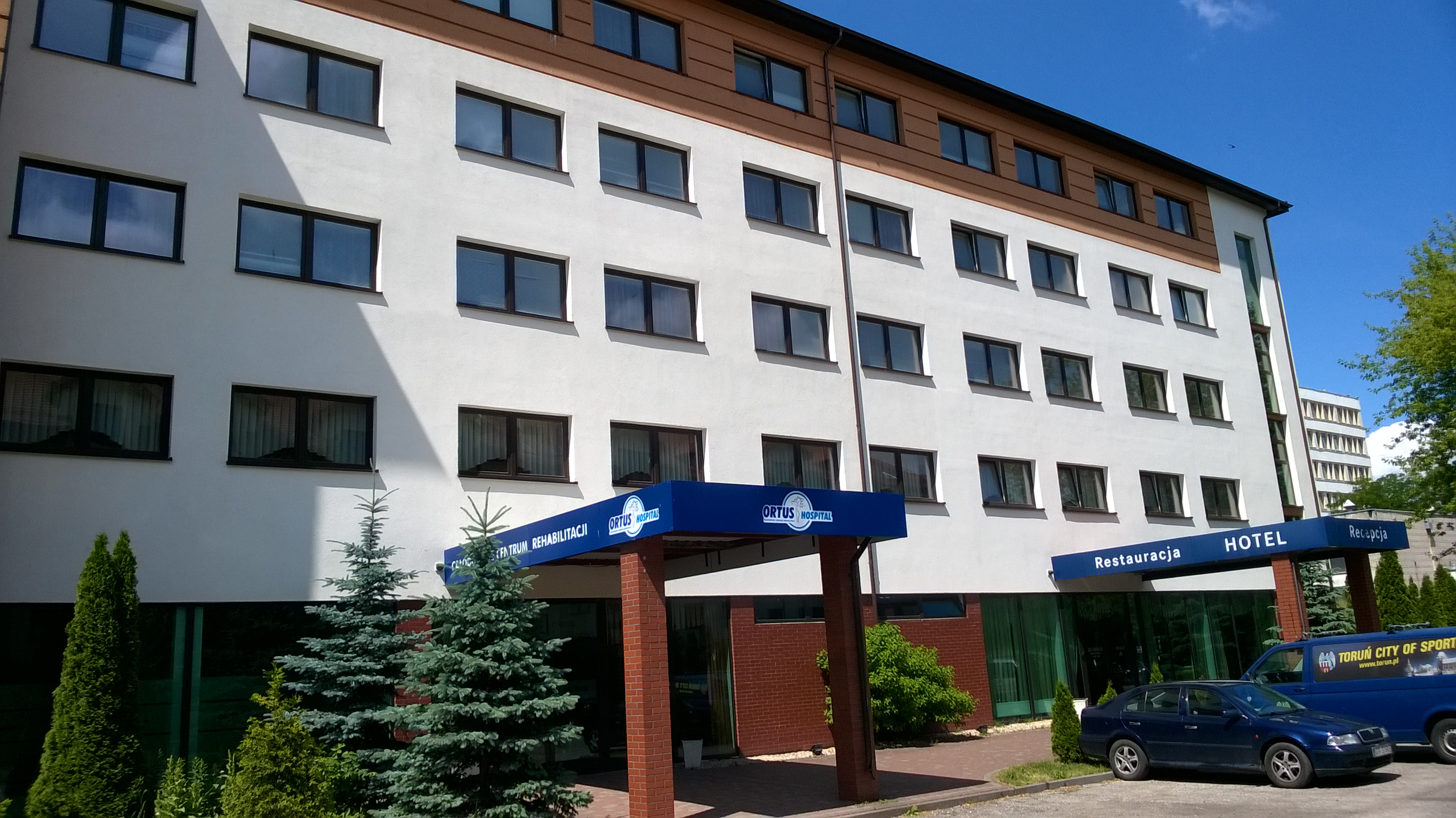 Centrum Rehabilitacji OrtusHospital w Toruniu